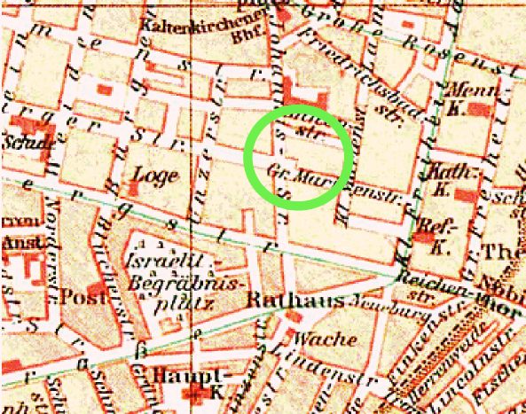 Darstellung des Ortes an den am der Altonaer Blutsonntag stattfand 17. Juli 1932